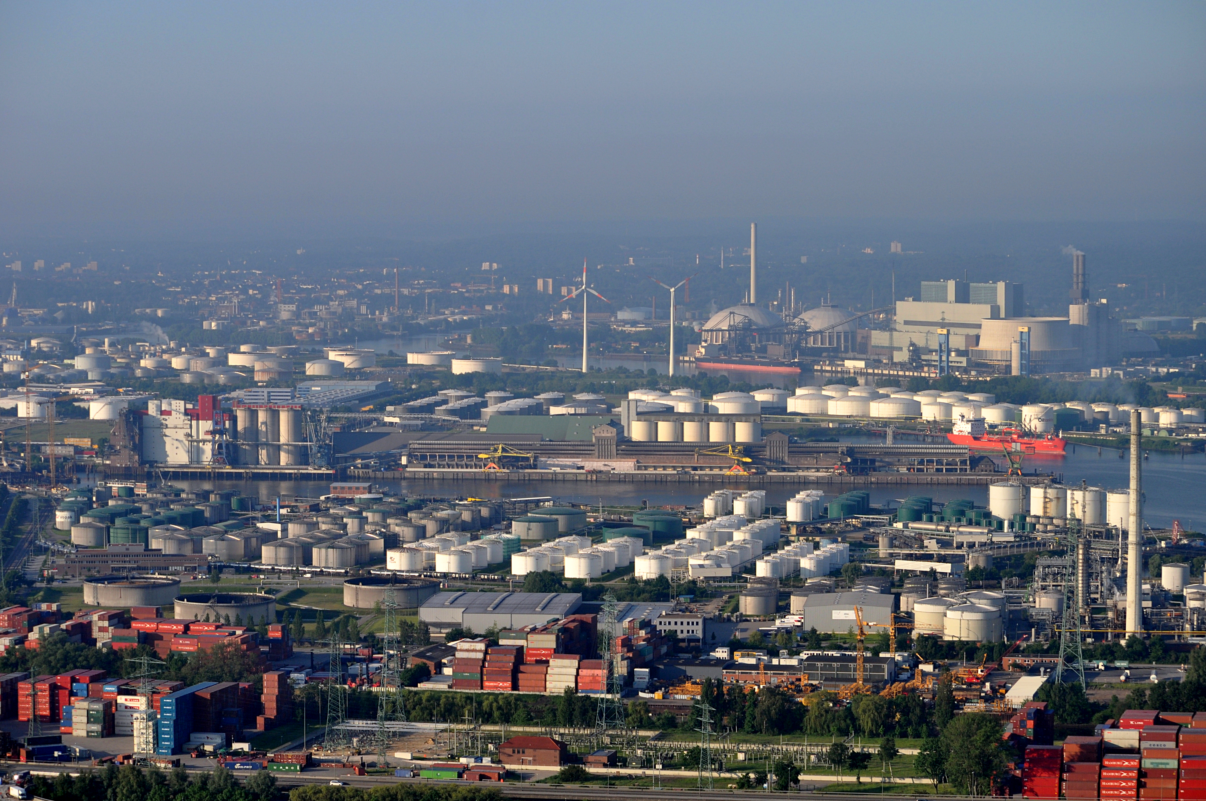 Blick über die Elbinsel Neuhof auf die Rethe und die Hohe Schaar in Hamburg-Wilhelmsburg.